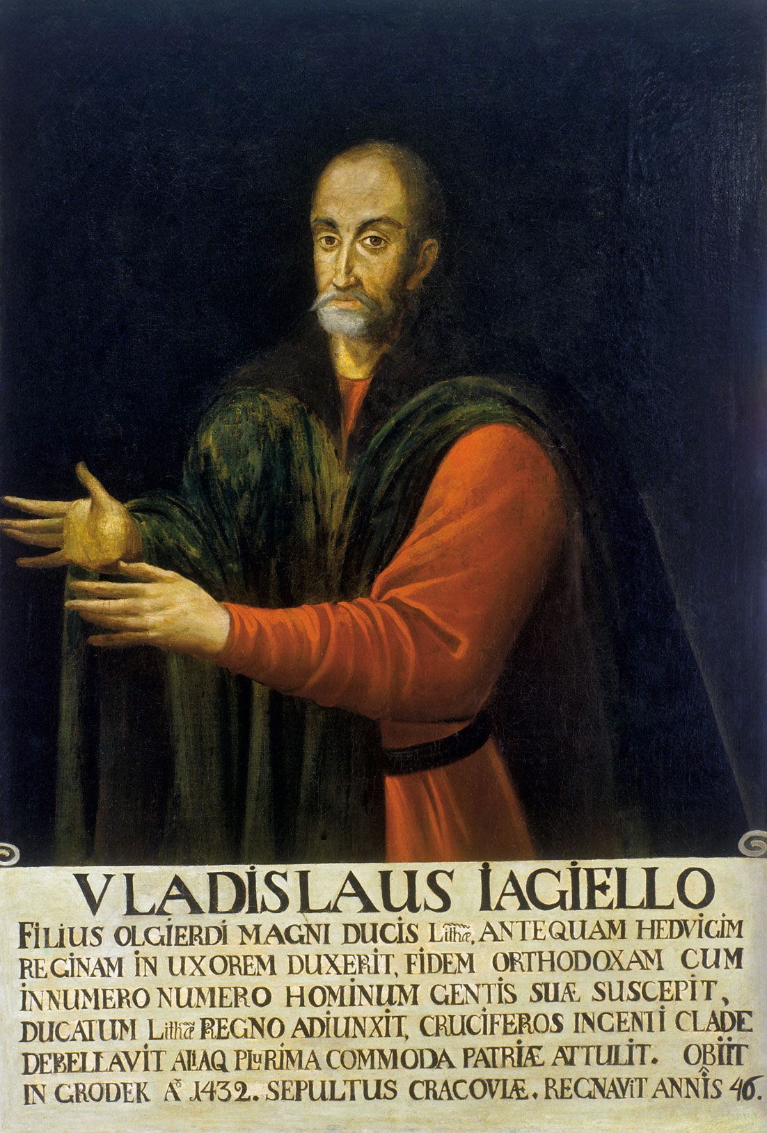 Беларуская (тарашкевіца): Партрэт вялікага князя літоўскага Ягайлы (Jagajła)